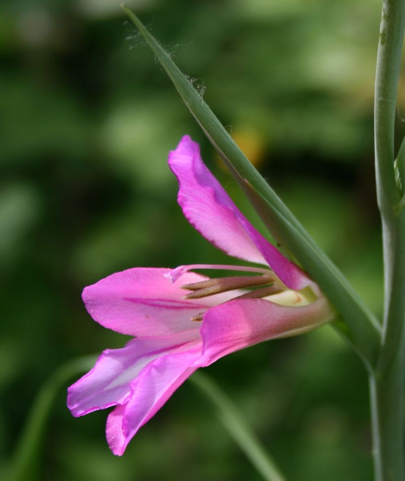 Gladiolus italicus, Schwertliliengewächse (Iridaceae) - Italien/Italia/Italy: Emilia-Romagna, Prov. Reggio nell'Emilia, NW Rossena